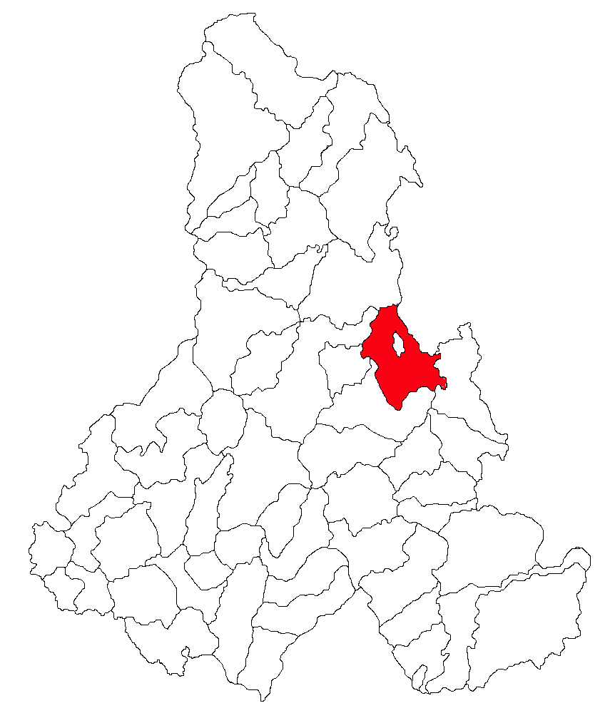 Categorie:Hărţi ale judeţului Harghita Contents 1 Licensing 2 Sursă 3 Licensing 4 Original upload log Licensing Sursă ro::Imagine:Harta_jud_Harghita.png